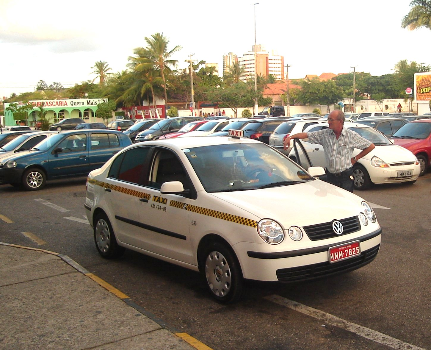 Táxi de Campina Grande, Brasil.